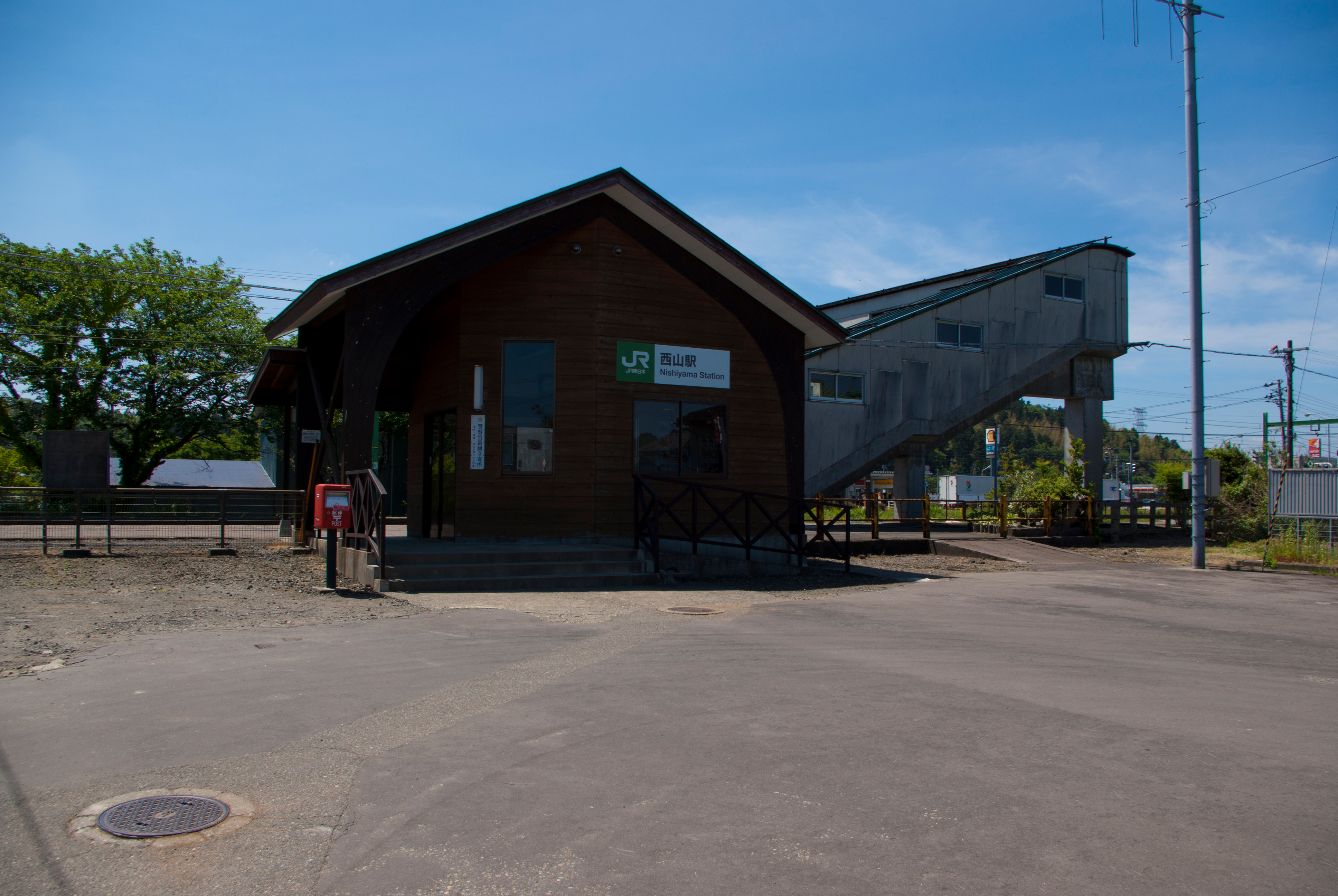 東日本旅客鉄道株式会社越後線西山駅